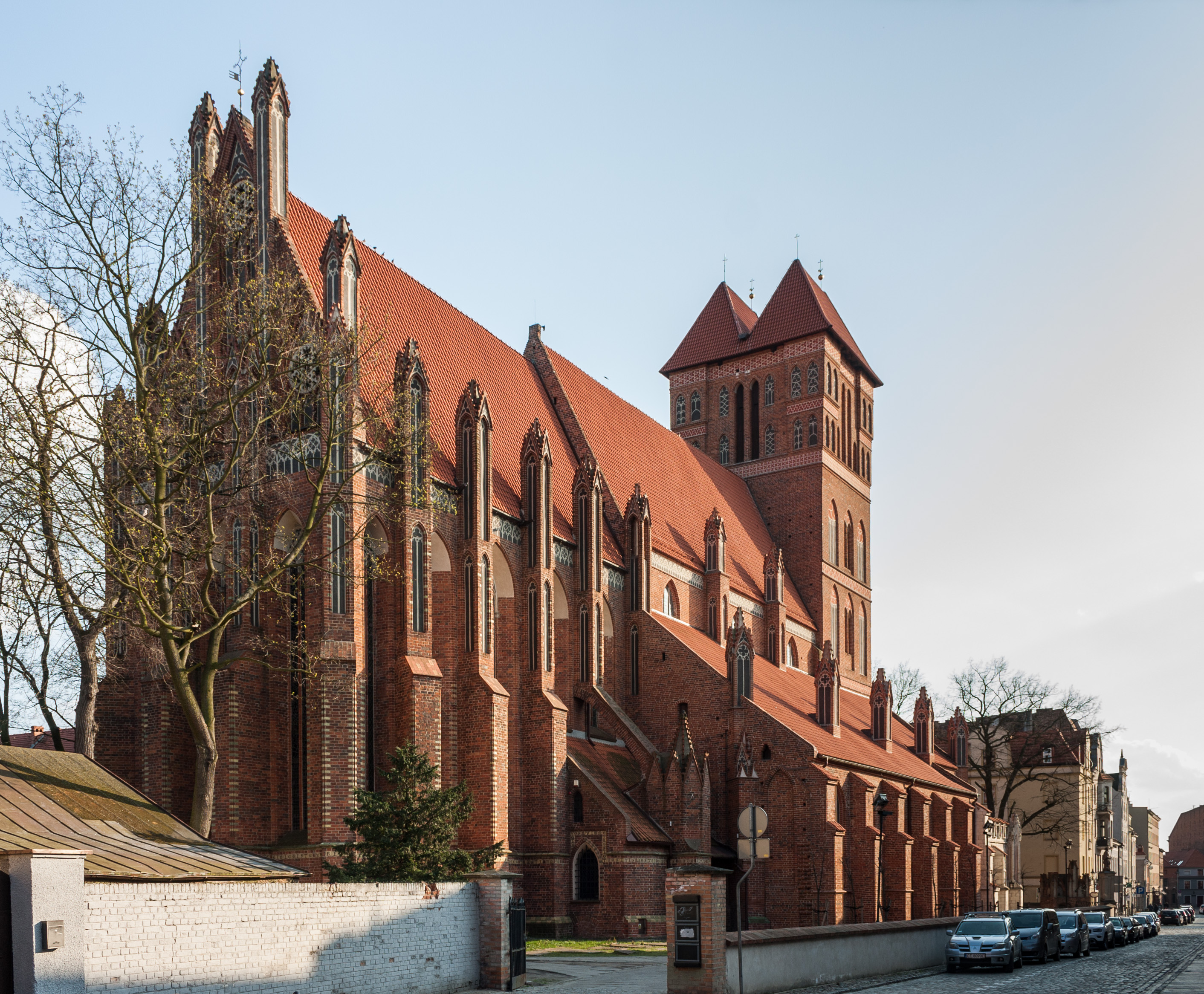 Kościół św. Jakuba w Toruniu, widok od strony ul. Szpitalnej.